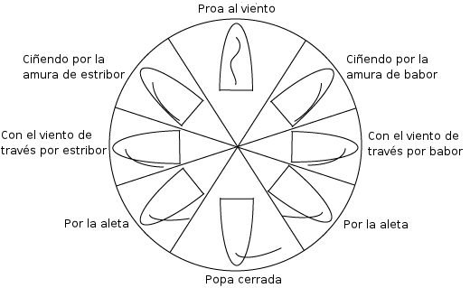 Imagen de las posiciones de un barco respecto del viento. Trabajo derivado de Allures.png, adaptación al español realizado por Patricio Lorente.